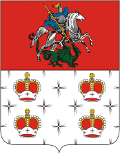 Герб города Дмитрова 1781 г. и 1991 г.